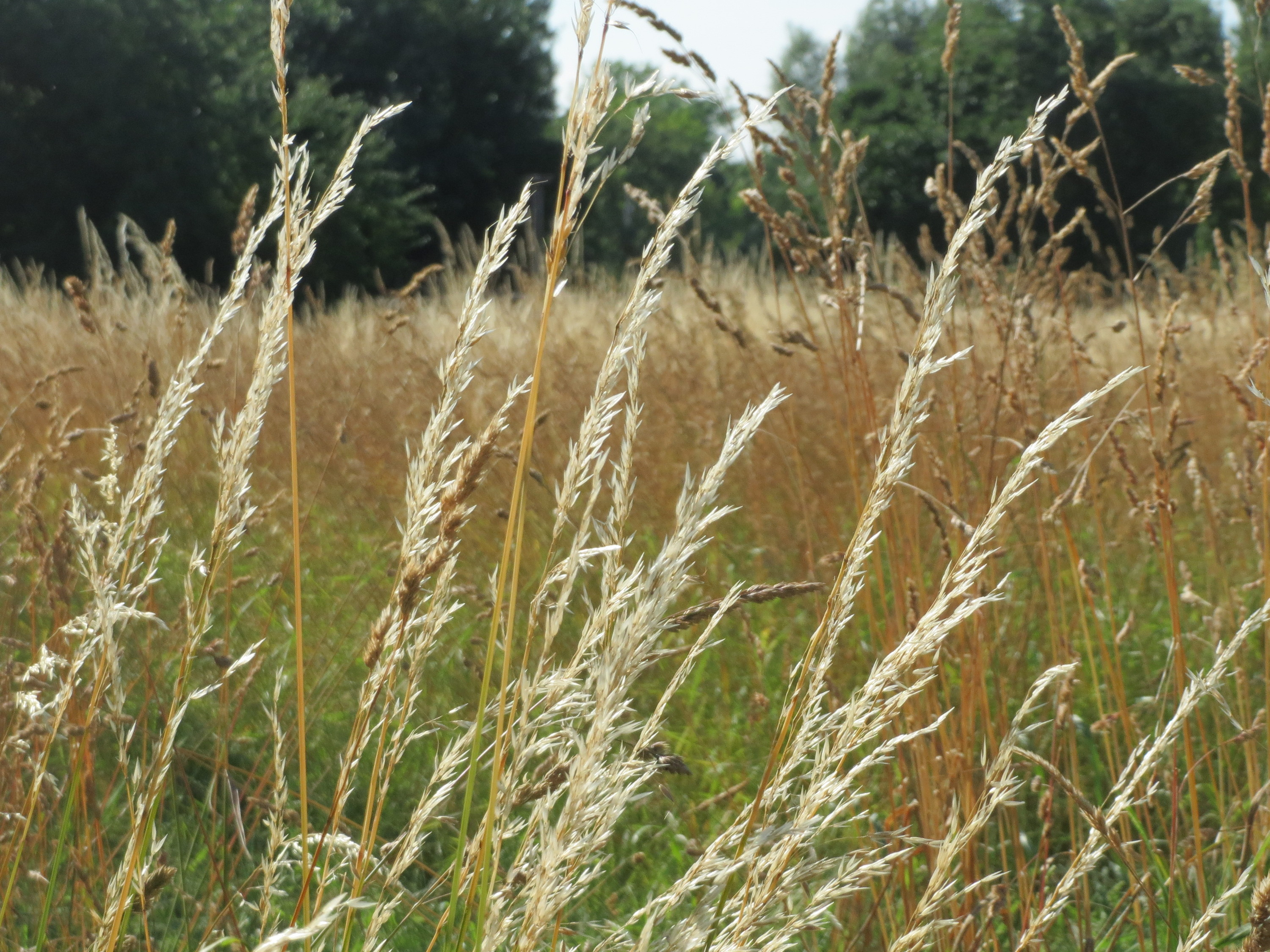 Gewöhnlicher Glatthafer (Arrhenatherum elatius) in Hockenheim